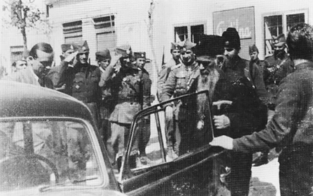 Српски (ћирилица): Владика Николај код Српских добровољаца у Илирској Бистрици. Поздрављају од лево ка десно потпоручник Д. Богићевић, ауђтант Љотићев и потпоручник Ђ. Ћосић. Лево од владике је поручник Варјашки, ађутант генерала Дамњановића.